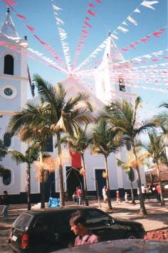 Igreja Matriz N. S. da Conceição em Cunha-SP